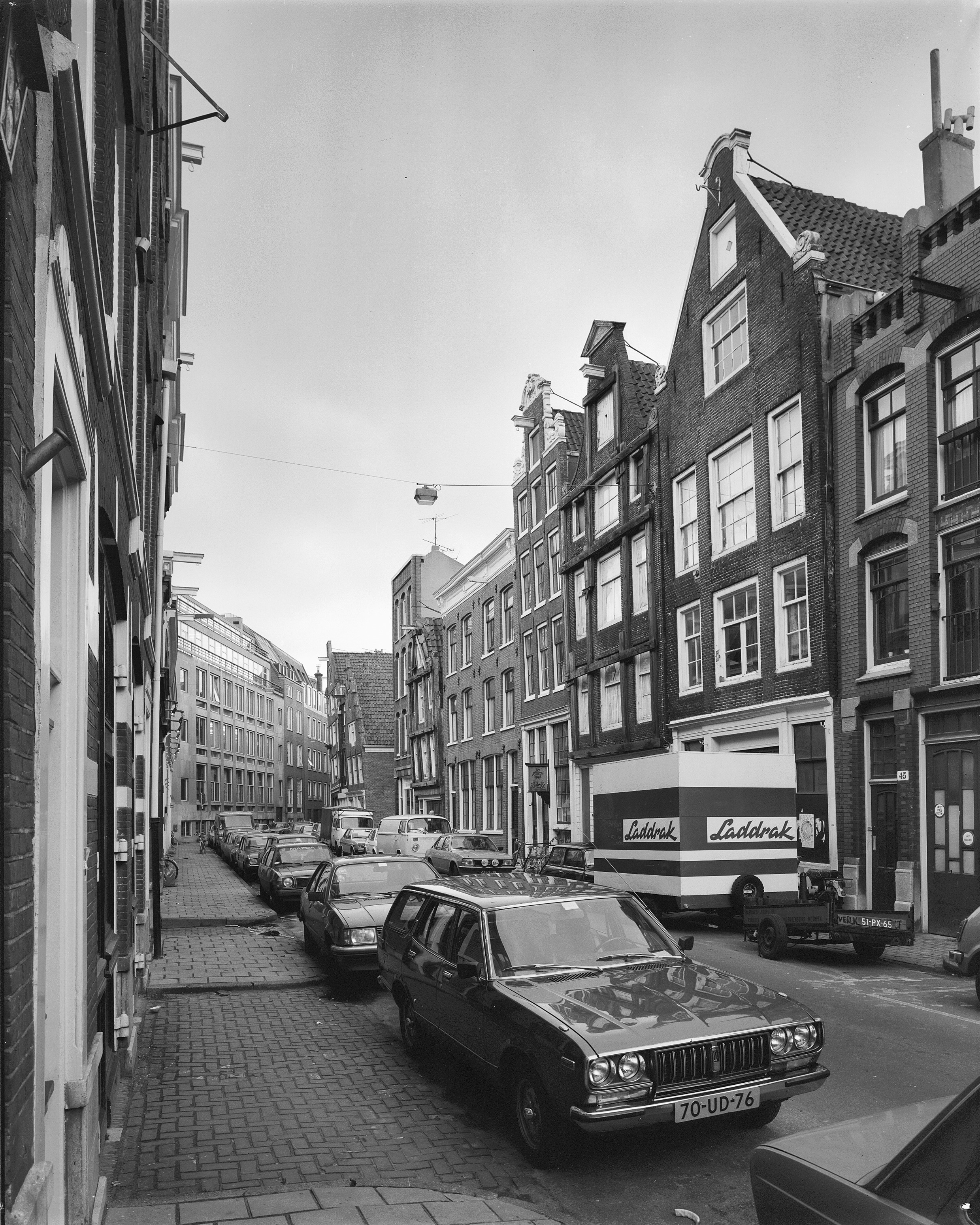 overzicht t/m 43